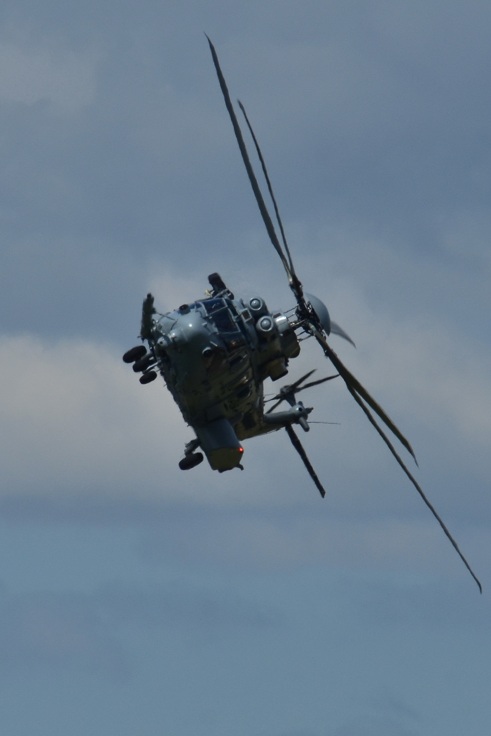 Photo prise à la BA-701 de Salon de Provence (LFMY) en France. Picture take at Salon de Provence AB - BA-701 (LFMY) in France.